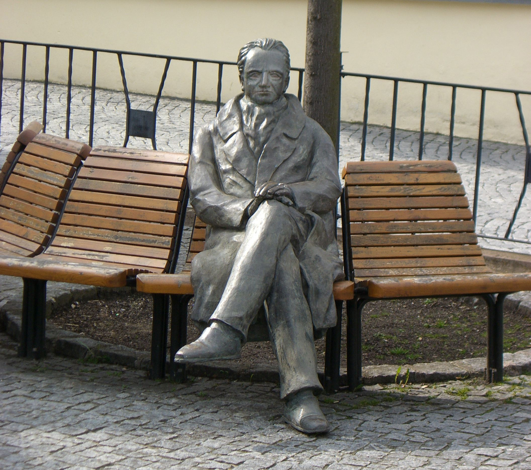 Das Goethe-Denkmal in Ilmenau am Ilmenauer Markt. Die Bronzefigur wurde vom Bildhauer Klaus Glutting aus Ilmenaus Partnerstadt Homburg gefertigt.